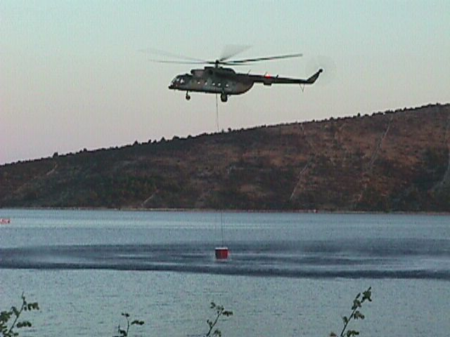 Protupožarni helikopter